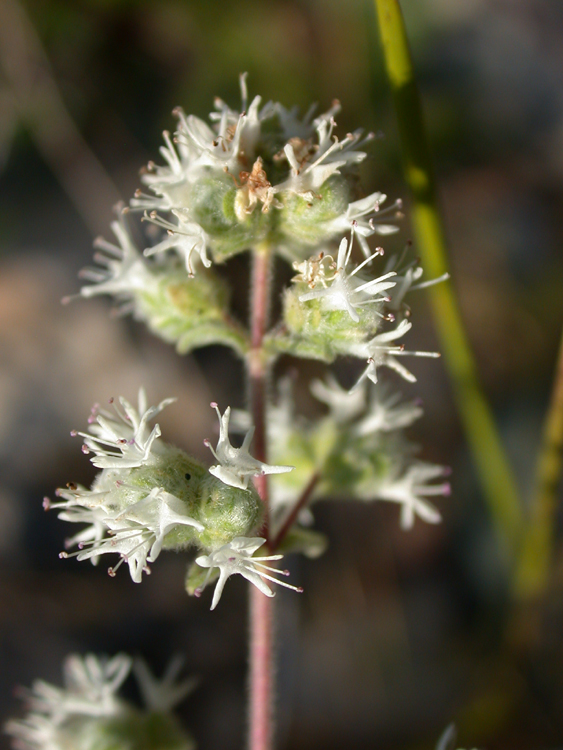 Majorana syriaca (L.) Kostel. (אזוב מצוי), Mount Carmel, Israel, May 2006.